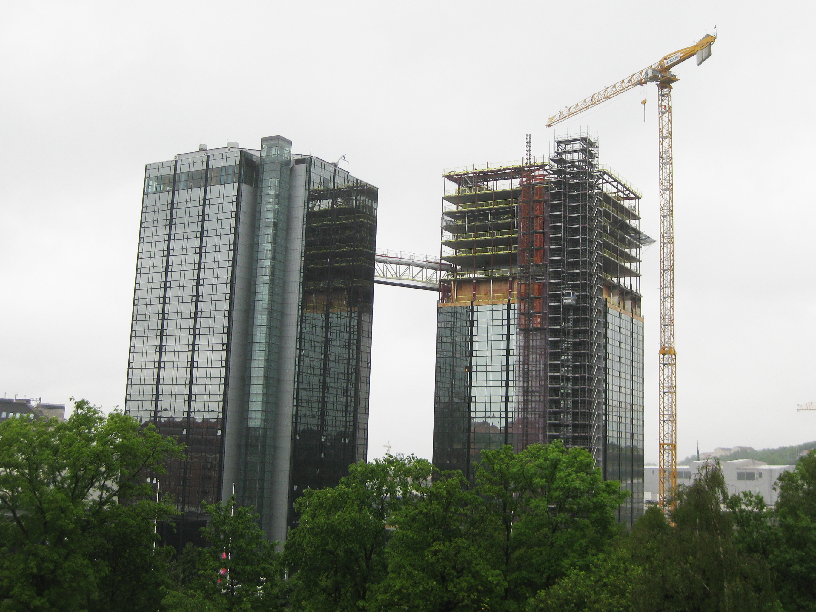 Gothia Towers i Göteborg. Två torn, varav det ena höjs. Grunden till ett tredje torn håller på att byggas.